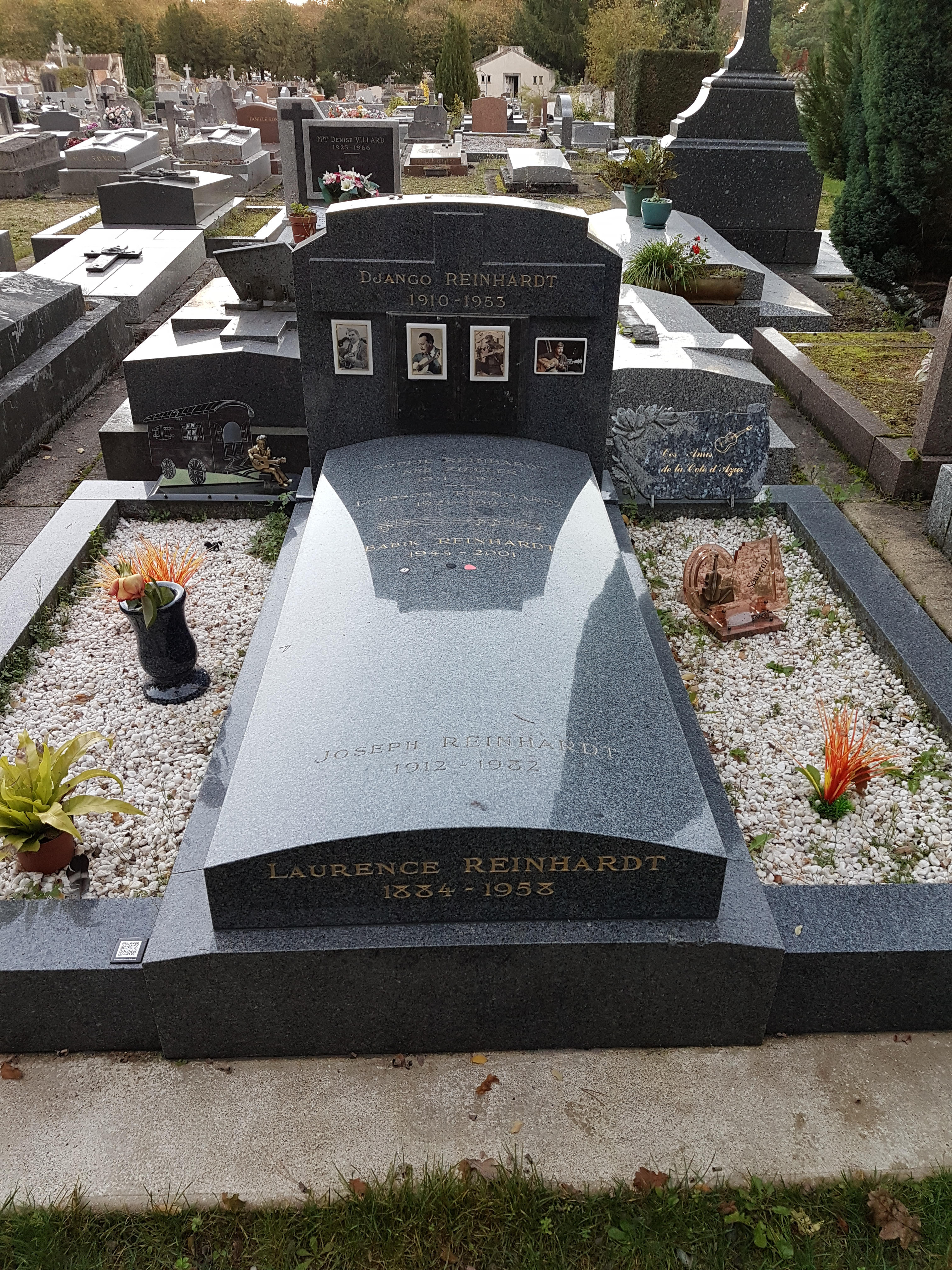 Tombeau de Django Reinhardt et de sa famille. Carré V. Cimetière de Samois-sur-Seine (Seine-et-Marne, France)